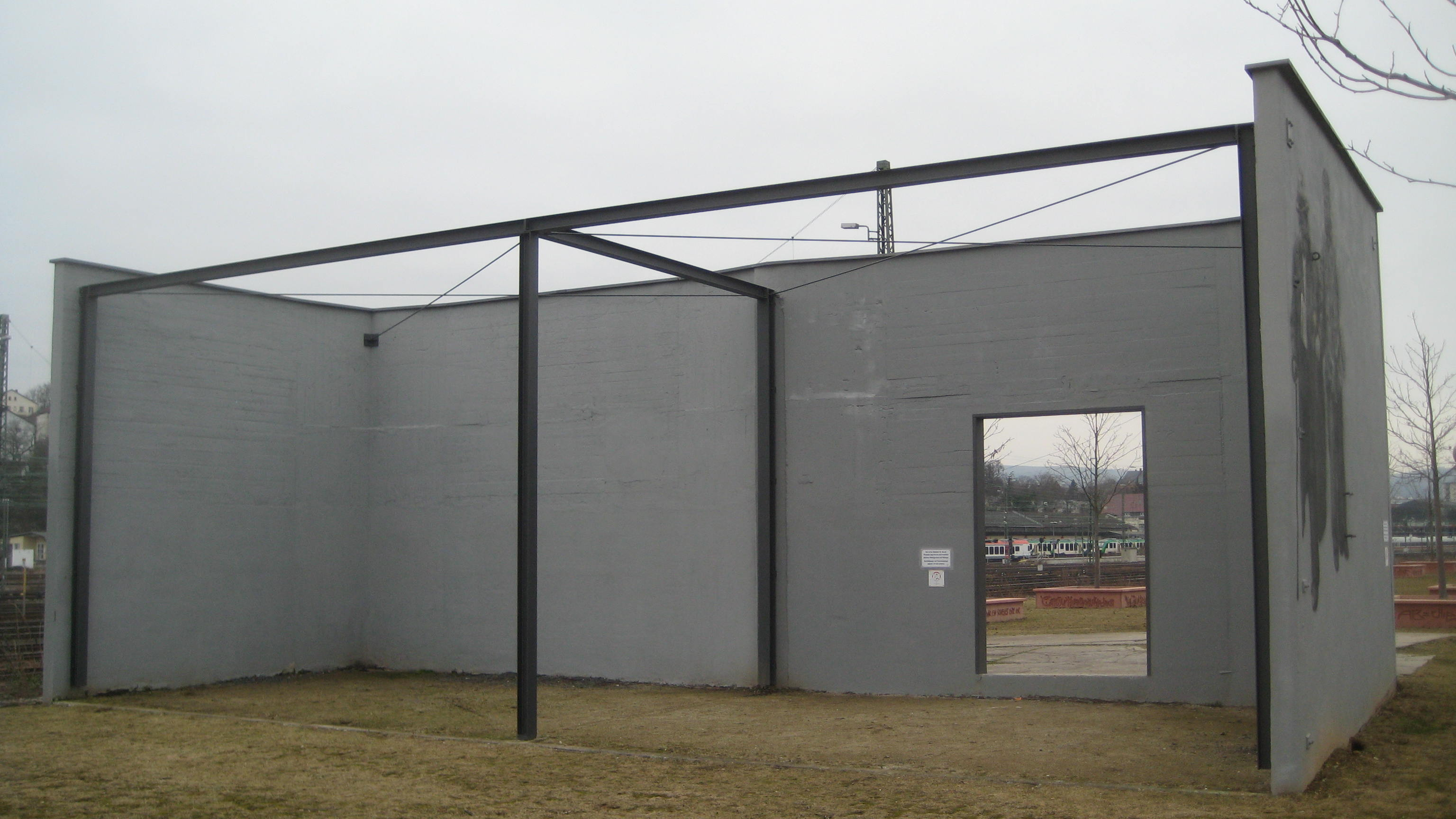 Deportationsmahnmal von Süden mit Durchblick auf Bäume und Baumscheiben mit den Brieffragmenten